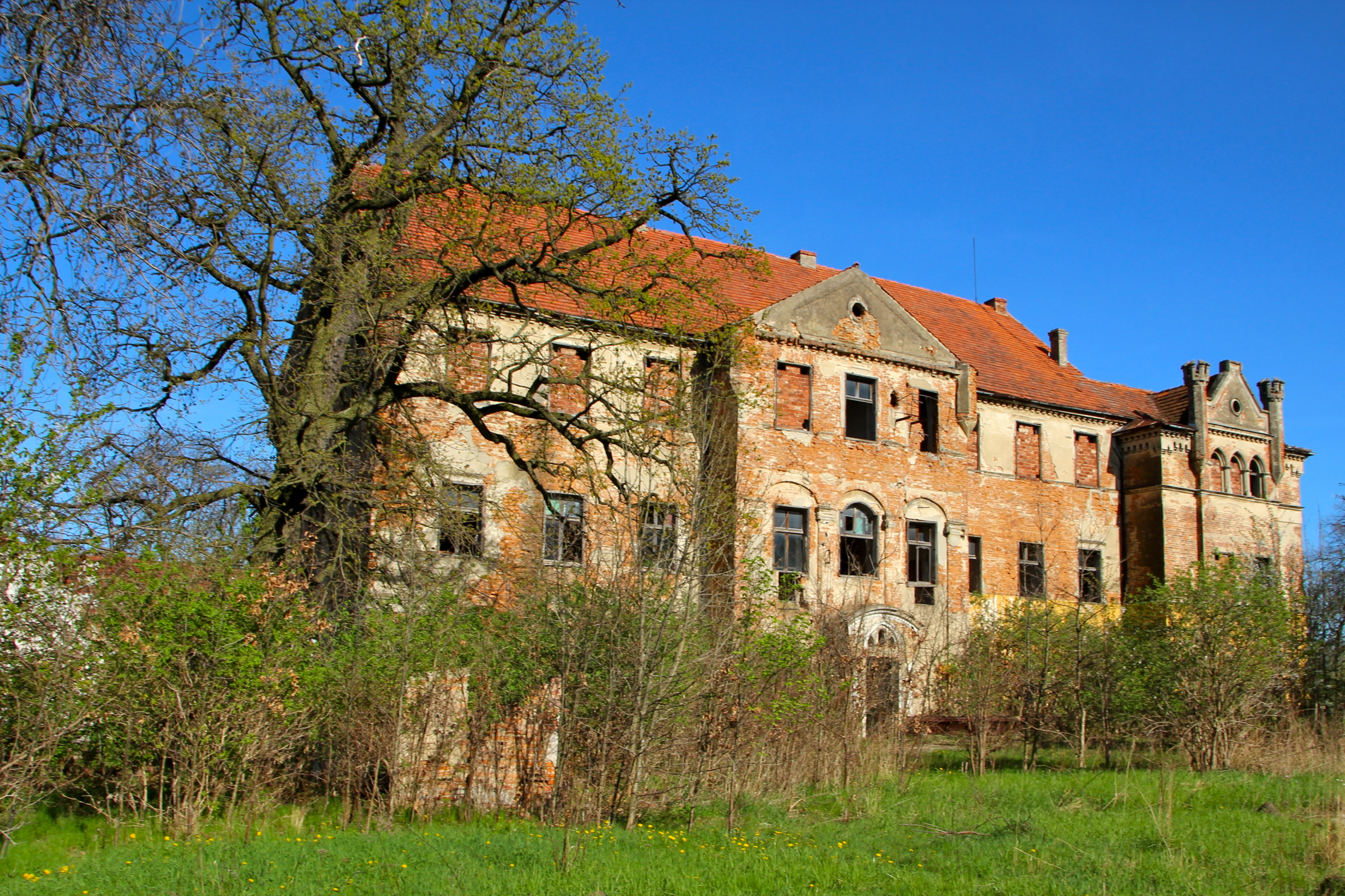 Kazimierz, ul. Zamkowa 93a – pałac, 2 poł. XIX w.